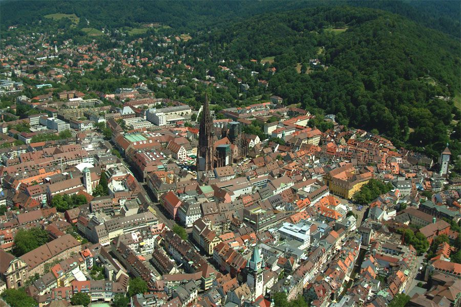 Aerial Picture Freiburg im Breisgau, Germany